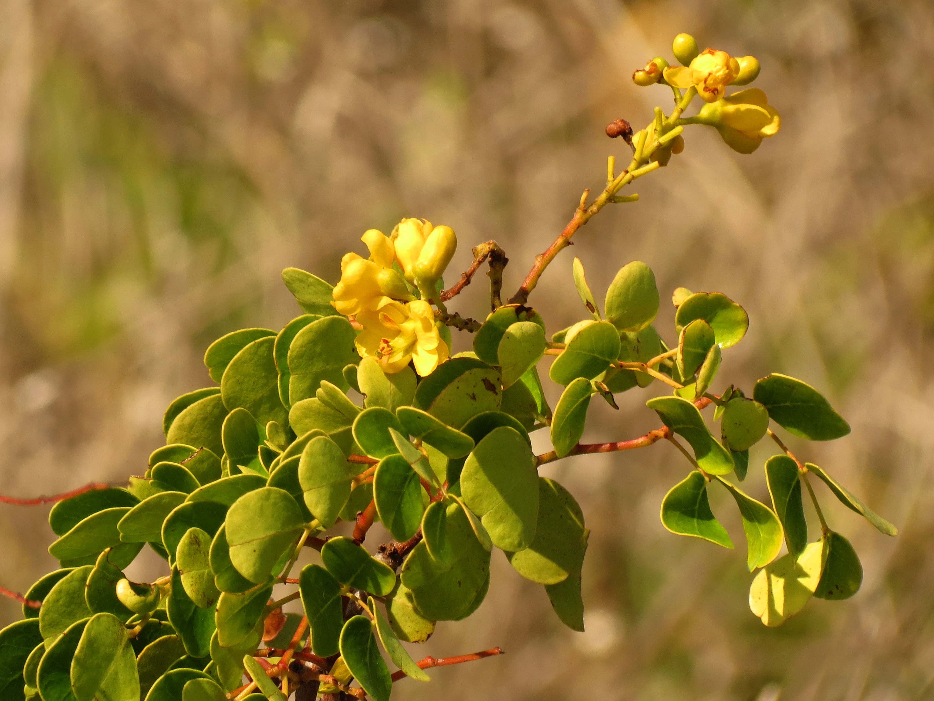 Caesalpinia vesicaria. Celestún Biosphere Reserve, Yucatán, México.